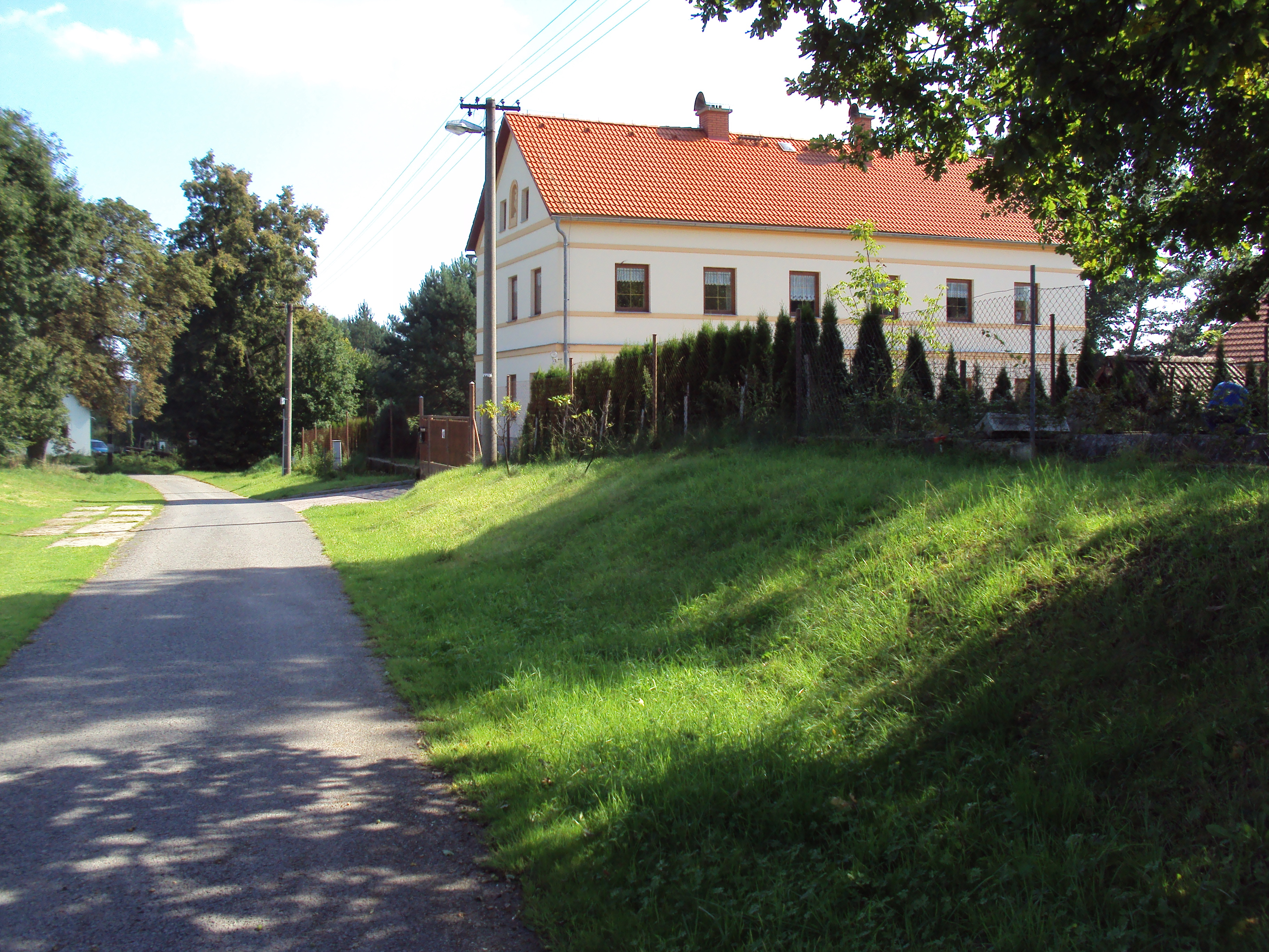 Minivesnička u České Lípy